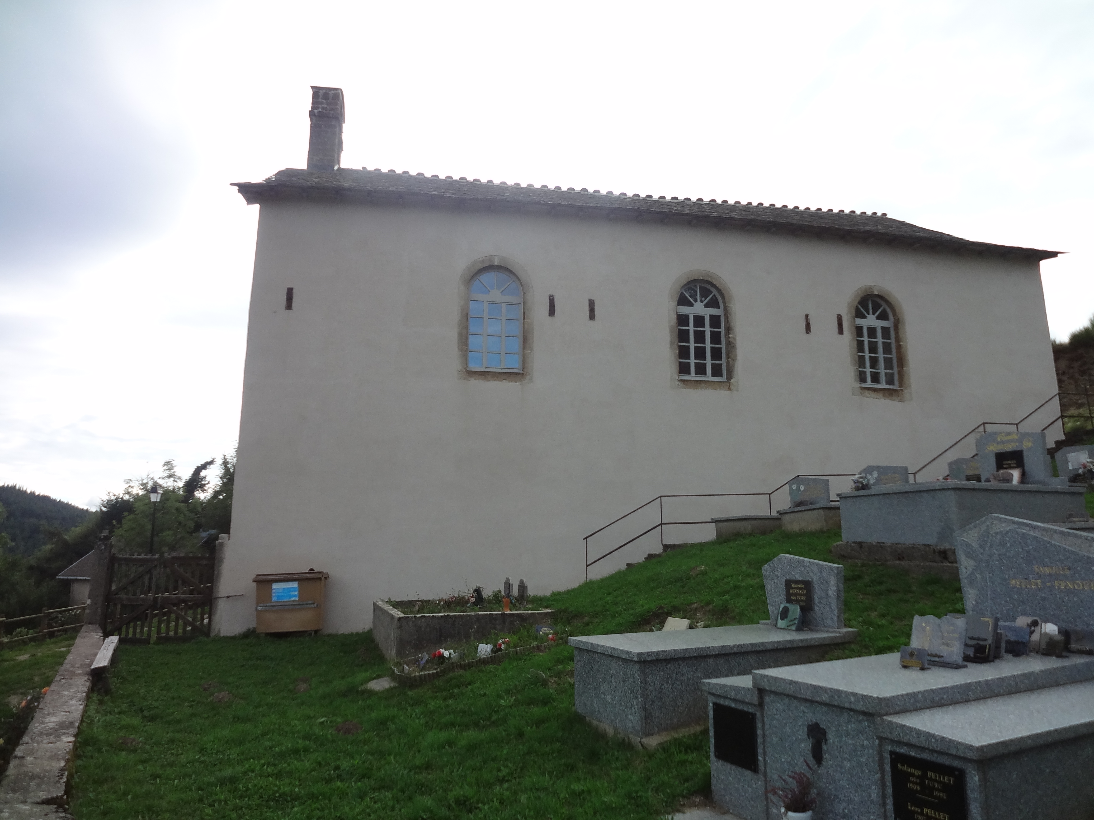 Cassagnas, temple, façade est